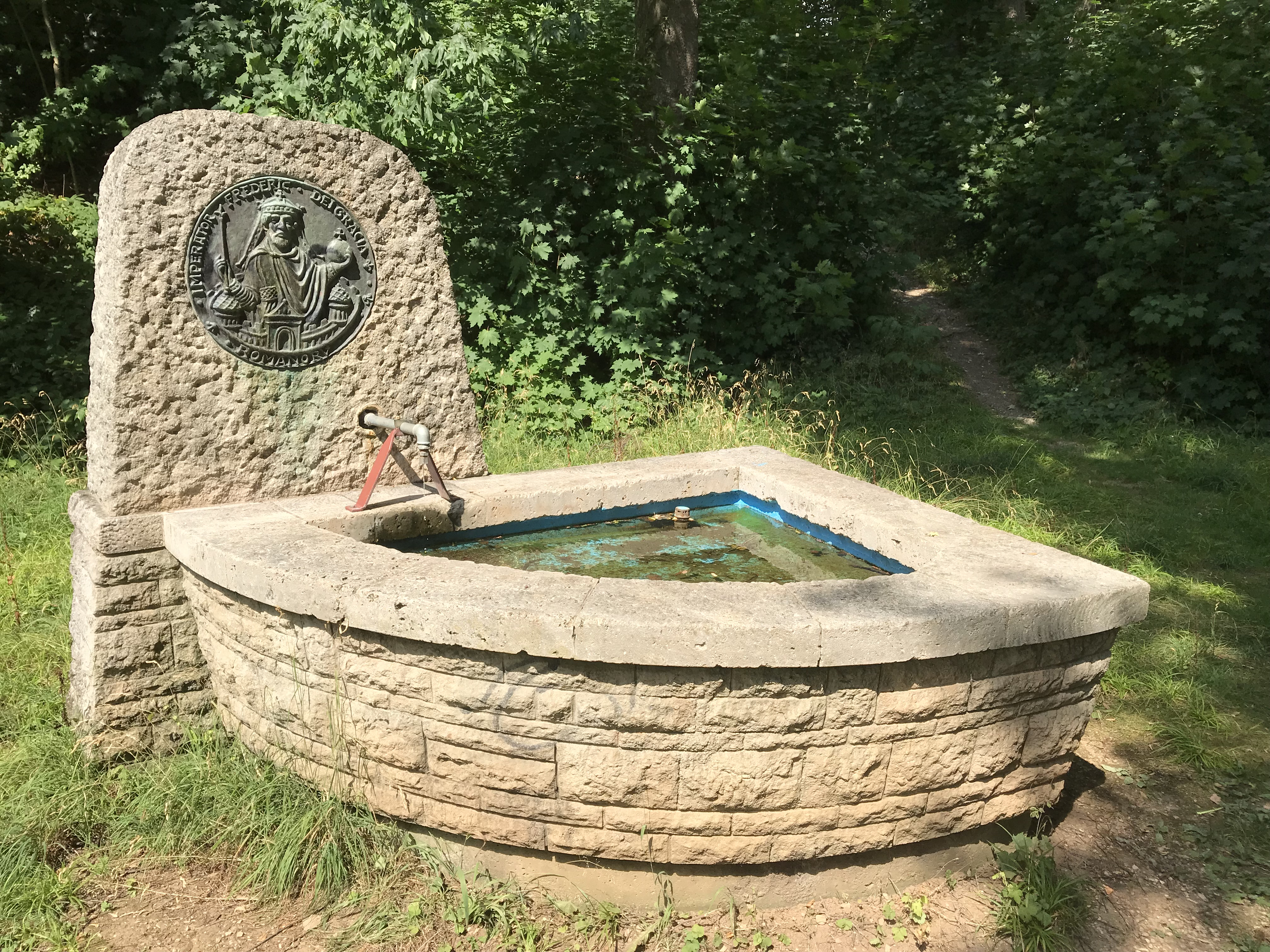 Barbarossa-Brunnen unterhalb vom Burgstall Aalen. Der Brunnen steht an der Langertstraße etwa in Höhe der Haus-Nr. 80 an einem Aufgang zum Burgstall. Die Plakette ist einem Siegel von Kaiser Friedrich I. Friedrich I. Barbarossa nachempfunden. Die Inschrift lautet: IMPERATOR FREDERIC[US] DEI GRATIA ROMANORU[M] (dt.: Friedrich von Gottes Gnade Kaiser der Römer).